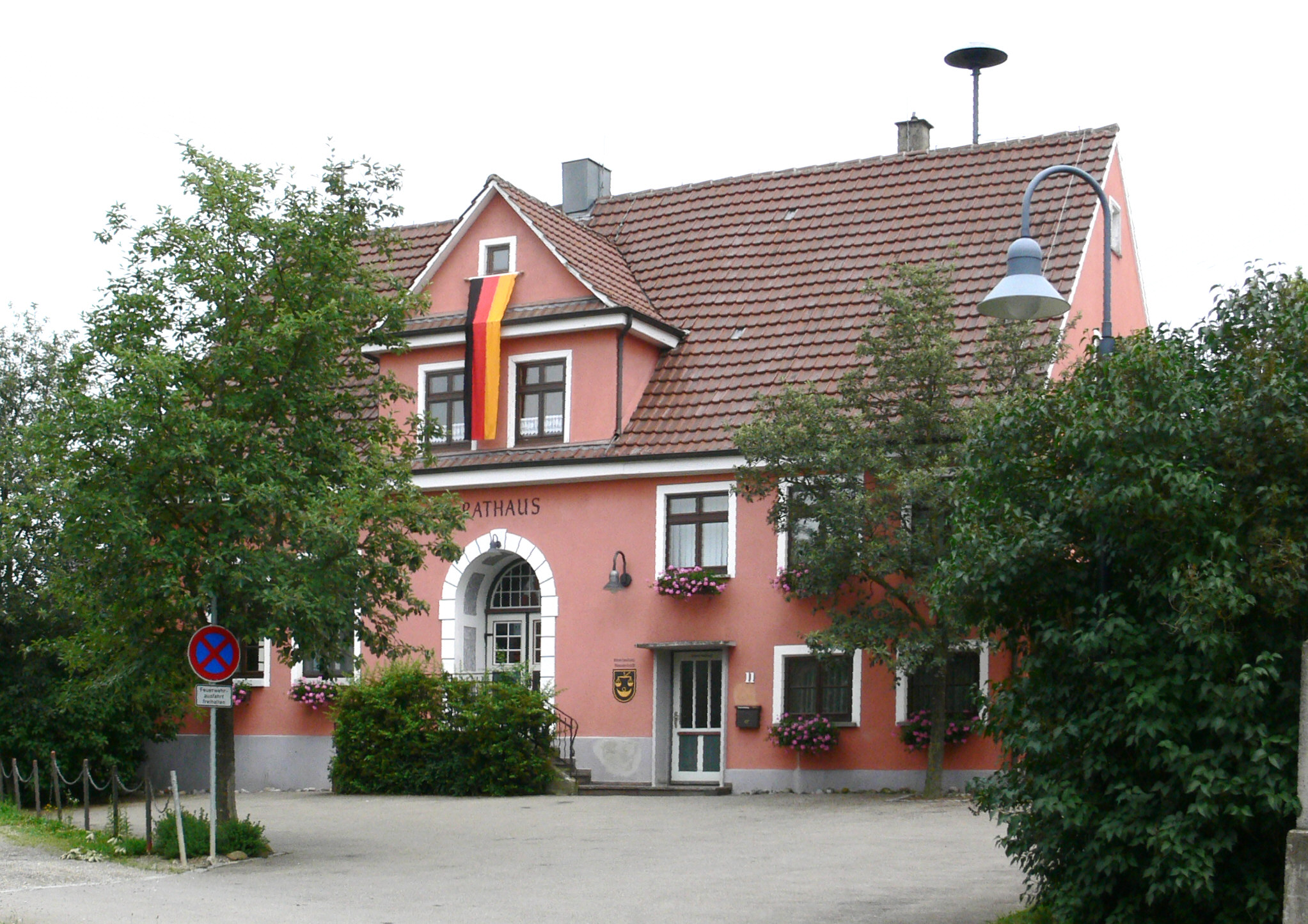 Rathaus Aßmannshardt Gemeinde Schemmerhofen, Landkreis Biberach, Baden-Württemberg